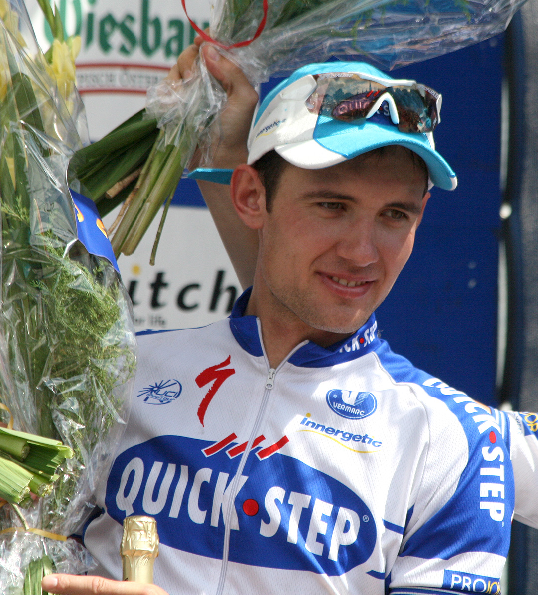 Branislau Samojlau, Österreich-Rundfahrt 2009